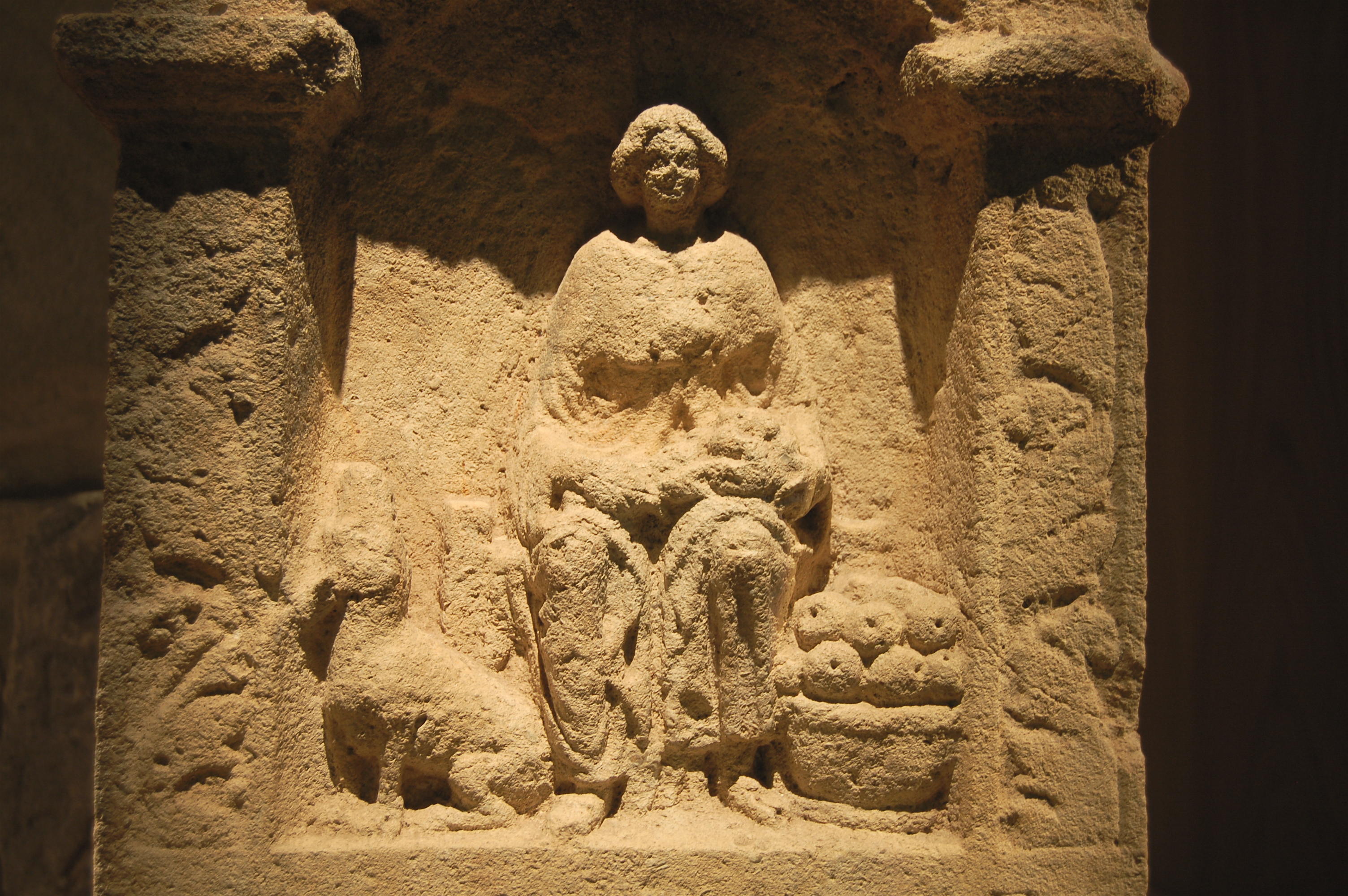 Voltarief van de Godin Nehalennia 150-250 na Chr. Voltarief van de Godin Nehalennia 150-250 na Chr. Leiden, Rijksmuseum van Oudheden Inv. i 1970/12.3, loan to Zeeuws Museum Middelburg